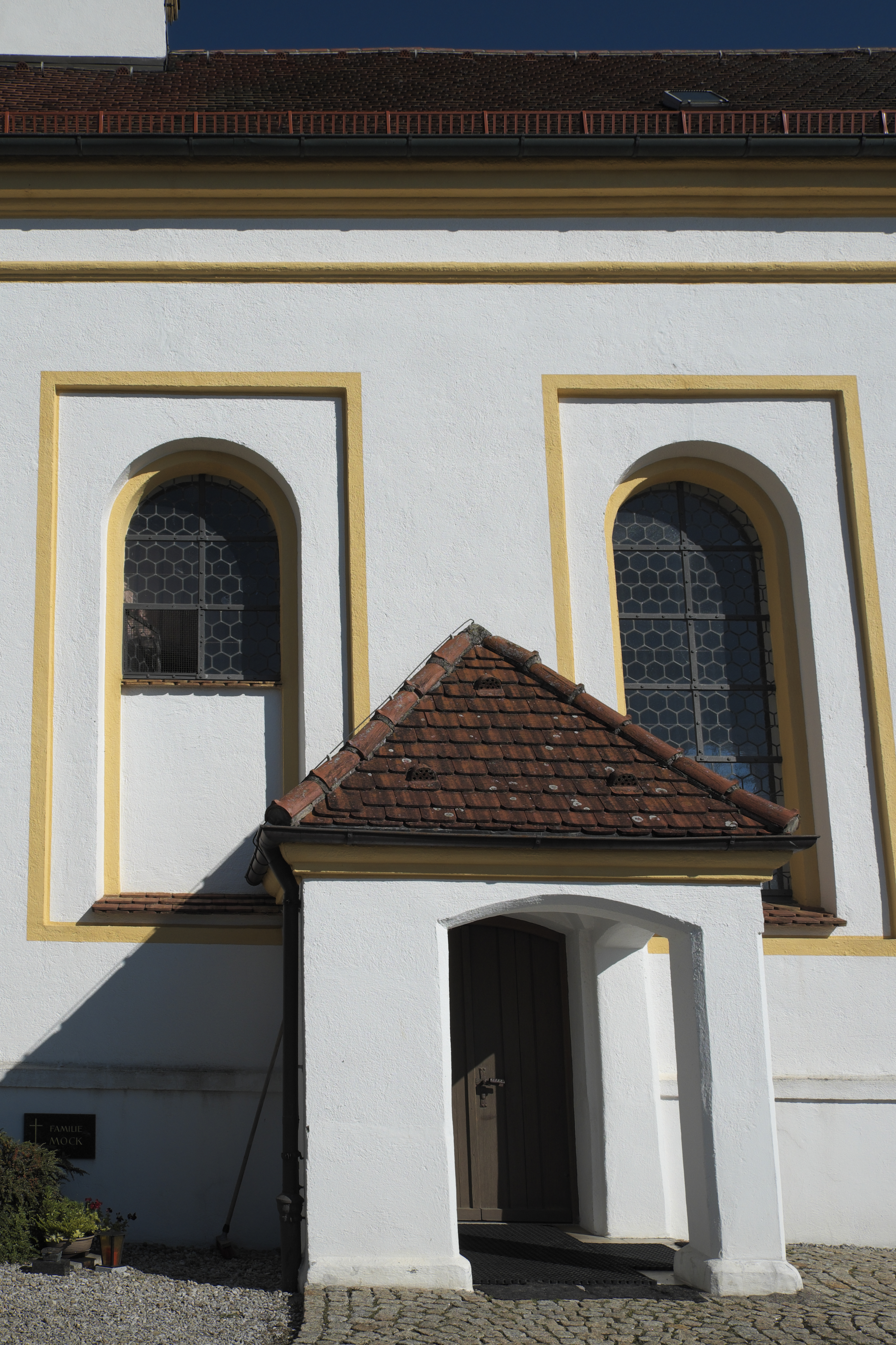 Katholische Filialkirche St. Pankratius in Ramsach (Penzing) im Landkreis Landsberg am Lech (Bayern/Deutschland), Südseite mit Vorzeichen